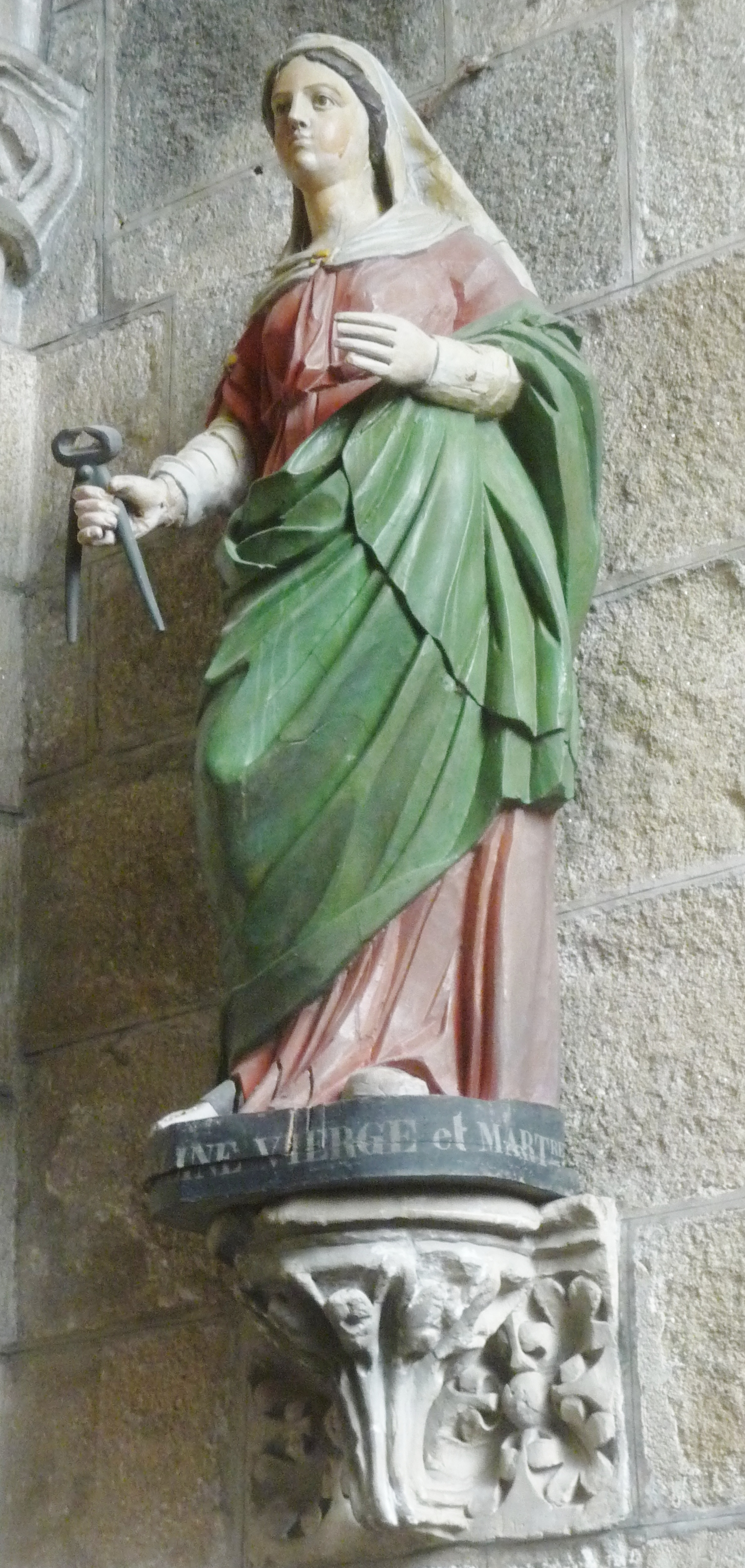 Saint-Pol-de-Léon : cathédrale Saint-Paul-Aurélien, statue en bois de sainte Apolline, patronne des dentistes (pour la torturer, ses persécuteurs lui arrachèrent les dents)